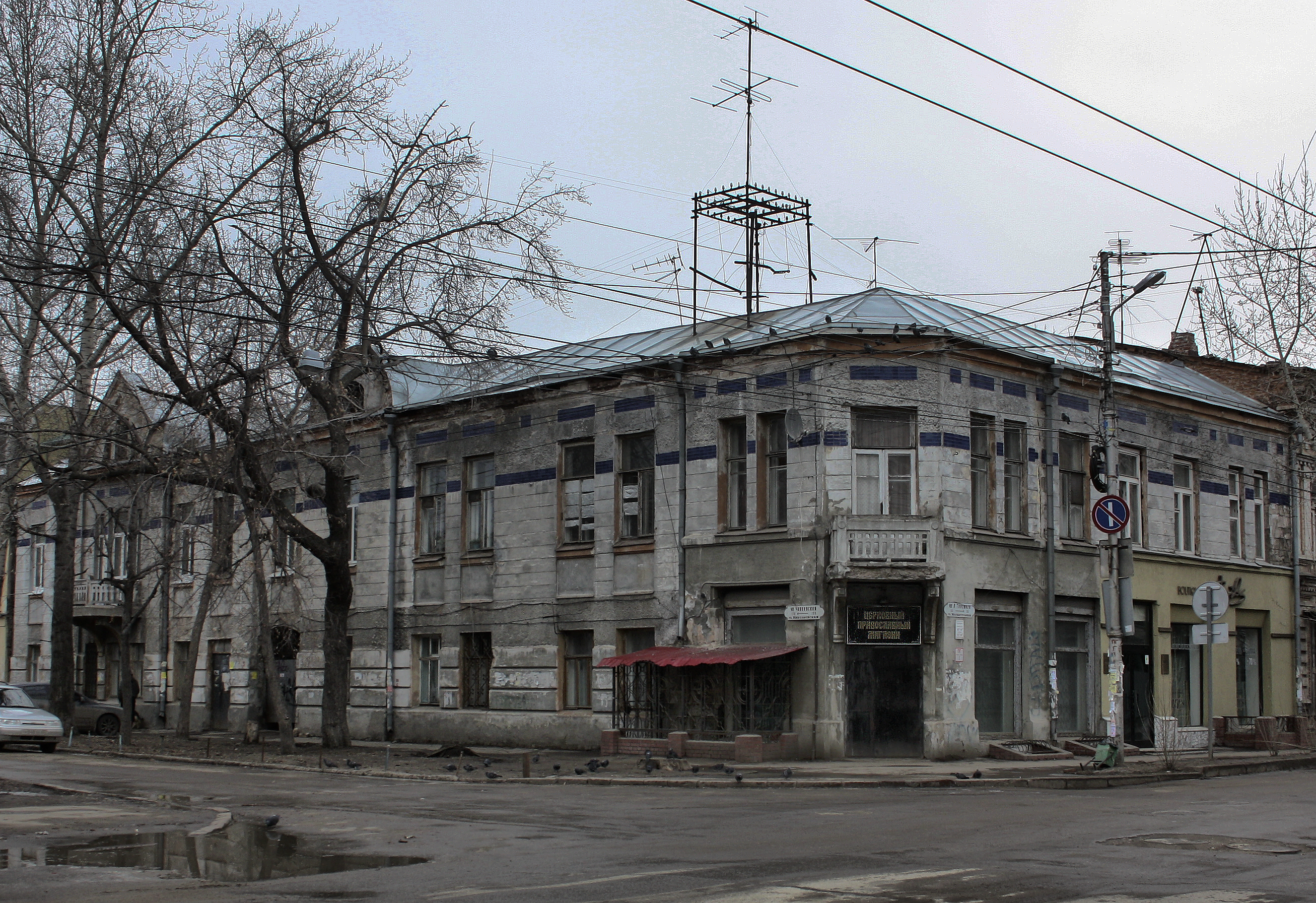 Самара, угол Чапаевская/Л.Толстого